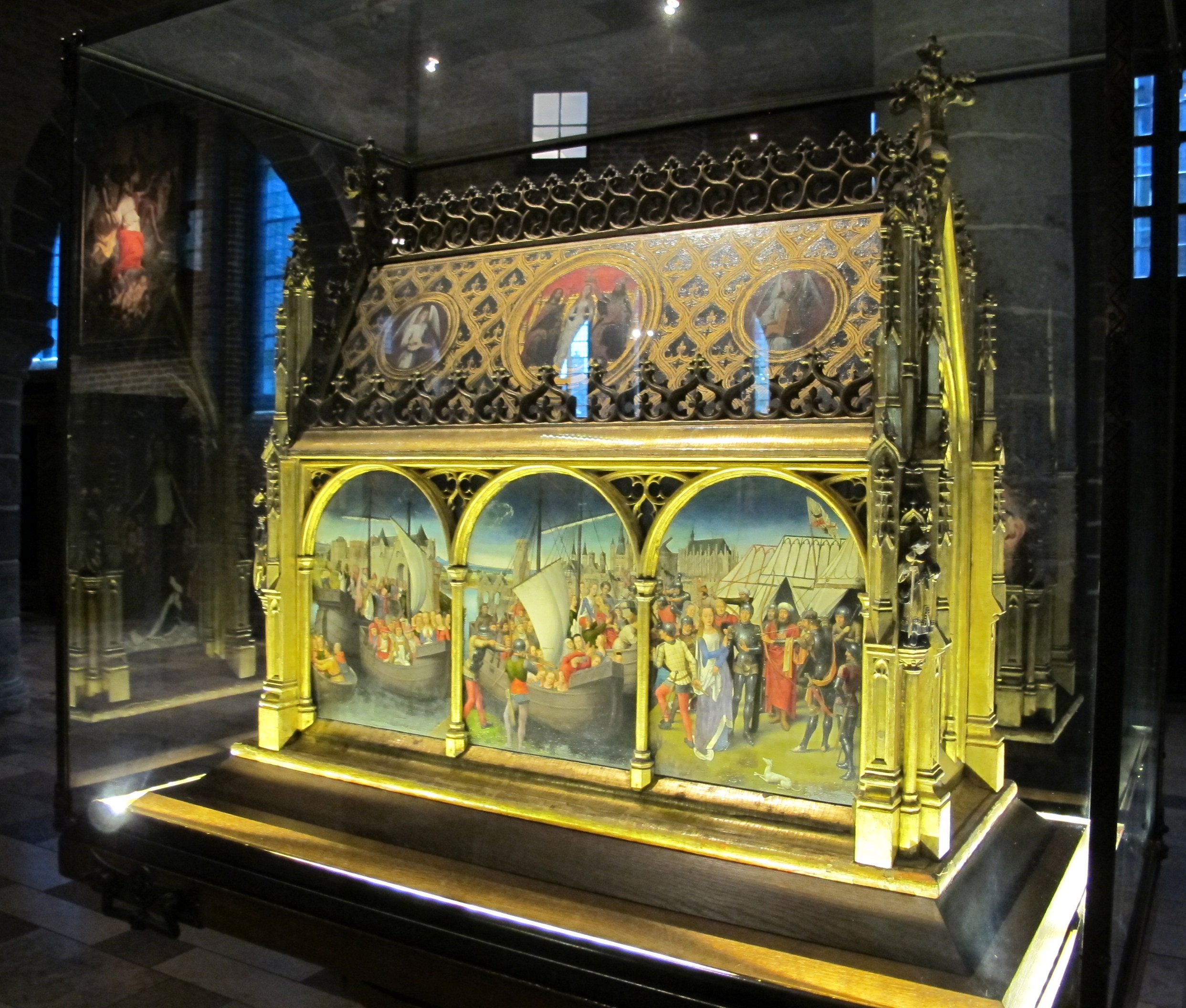 Hans memling, cassa di sant'orsola, 1489